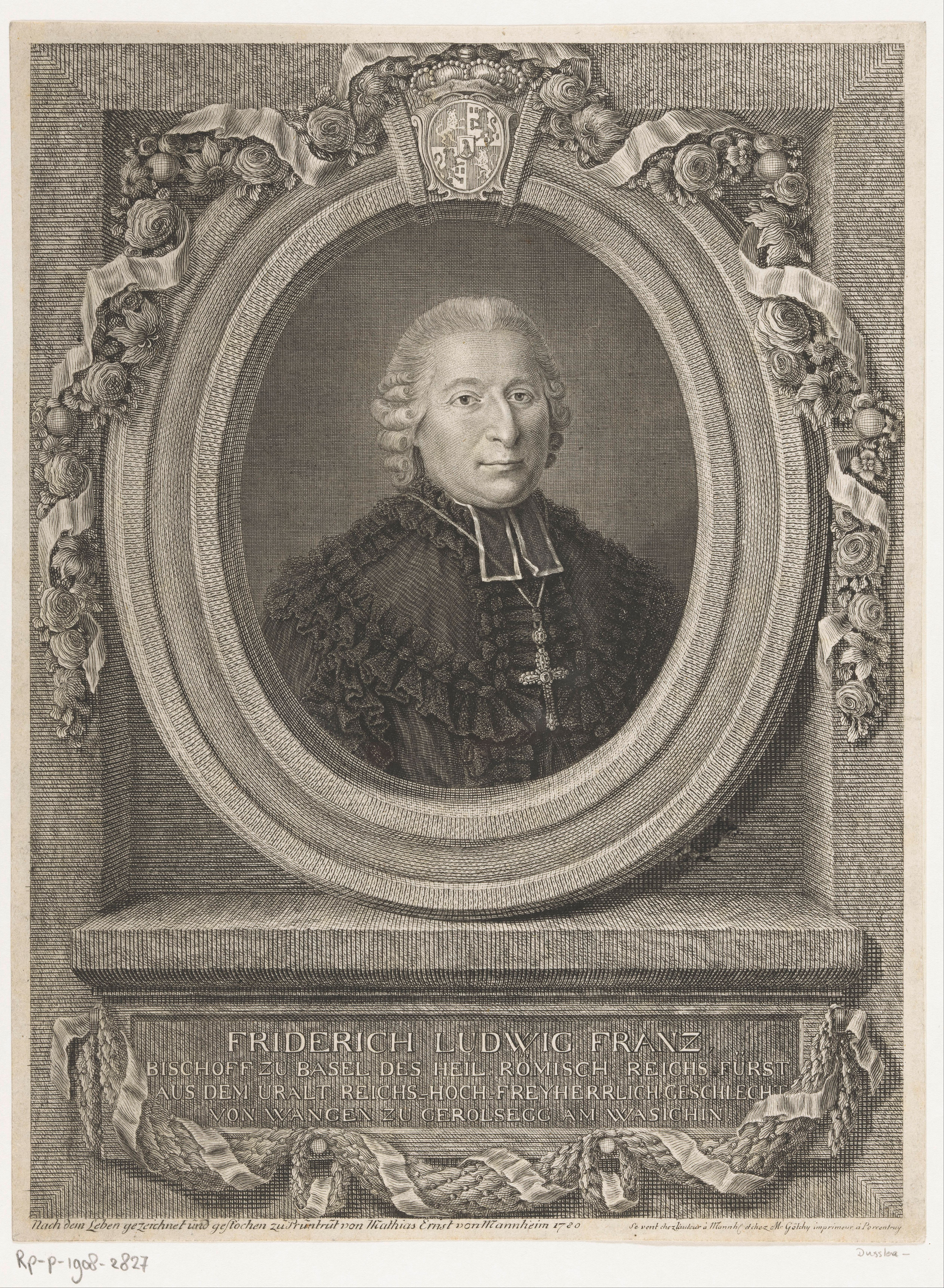 IdentificatieTitel(s): Portret van Friedrich Ludwig Franz von Wangen zu GeroldseckObjecttype: prent Objectnummer: RP-P-1908-2827Catalogusreferentie: LeBlanc 4Opschriften / Merken: verzamelaarsmerk, verso, gestempeld: Lugt 2228VervaardigingVervaardiger: prentmaker: Karl Mathias Ernst (vermeld op object)naar tekening van: Karl Mathias Ernst (vermeld op object)uitgever: Karl Mathias Ernst (vermeld op object)uitgever: Götchy (vermeld op object)Plaats vervaardiging: prentmaker: Mannheimnaar tekening van: Mannheimuitgever: Mannheimuitgever: PorrentruyDatering: 1780Materiaal: papier Techniek: graveren (drukprocedé)Afmetingen: blad: h 288 mm (binnen plaatrand afgesneden) × b 217 mm (binnen plaatrand afgesneden)OnderwerpWat: historical personsarchbishop, bishop, etc. (Roman Catholic)ornament ~ festoon, garlandarmorial bearing, heraldrycrucifix ~ personal devotionWie: Friedrich Ludwig Franz von Wangen zu GeroldseckVerwerving en rechtenVerwerving: aankoop 1905Copyright: Publiek domein